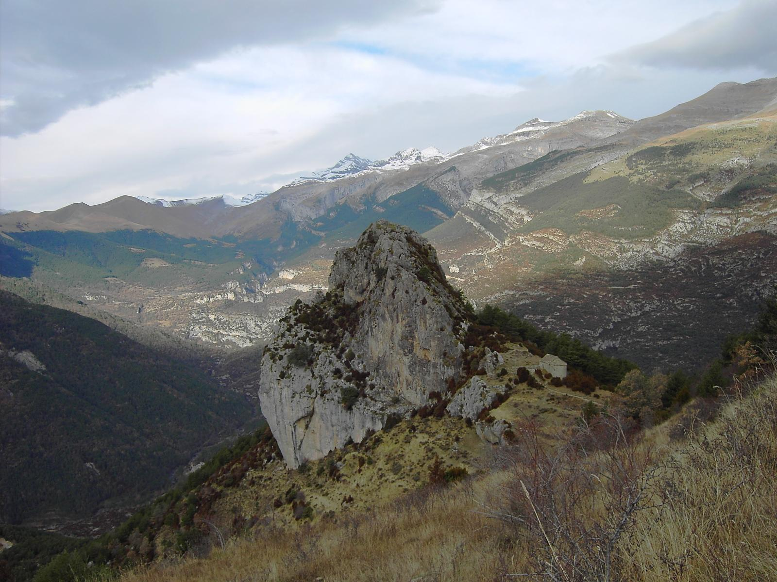 La Ermita de San Juan y San Pablo (S. XI), con el valle de Tella de Fondo.